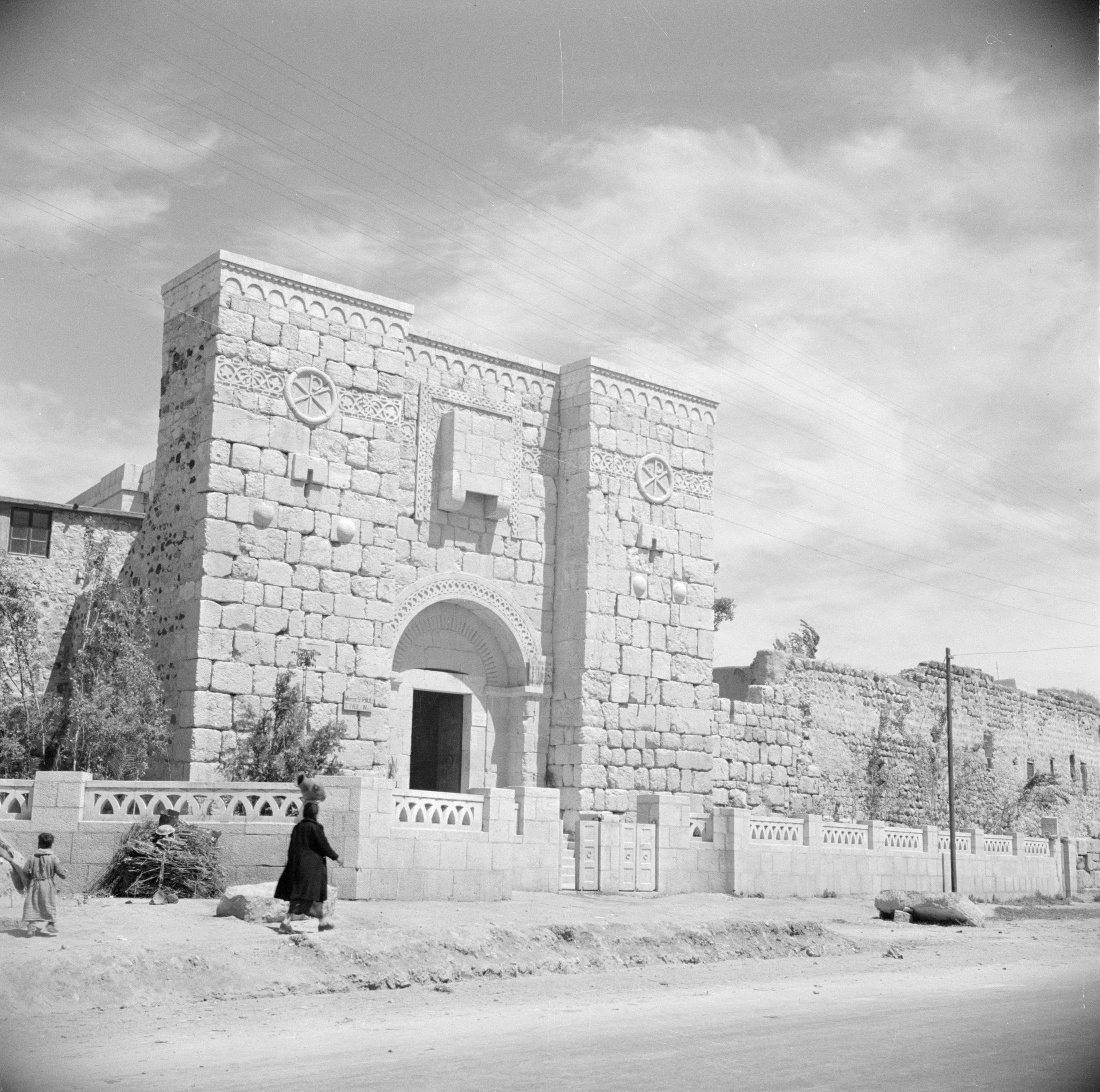 Collectie / Archief : Fotocollectie Van de Poll Reportage / Serie : Midden-Oosten 1950-1955: Syrië - Damascus Beschrijving : Poort 'Bab Kisan' een van de stadspoorten in de stadsmuur Annotatie : Het raam boven de poort is volgens de overlevering het raam waardoor de apostel Paulus ontsnapte toe hij door de Joodse gemeenschap van Damascus met de dood bedreigd werd Datum : 1950 Locatie : Damascus, Syrië Trefwoorden : ramen, stadspoorten Fotograaf : Poll, Willem van de Auteursrechthebbende : Nationaal Archief Materiaalsoort : Negatief (zwart/wit) Nummer archiefinventaris : bekijk toegang 2.24.14.02 Bestanddeelnummer : 255-5856